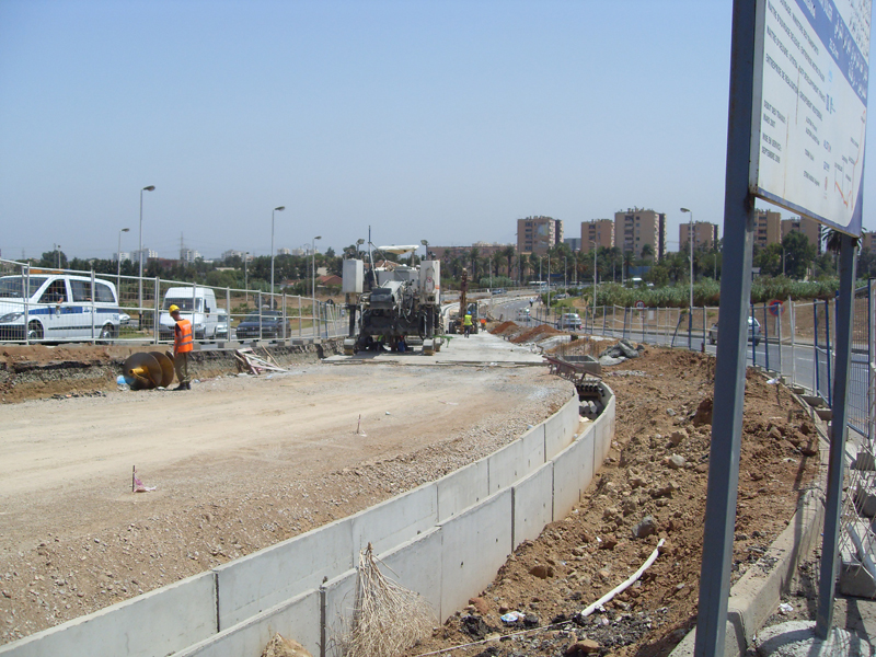 Travaux du tramway d'Alger